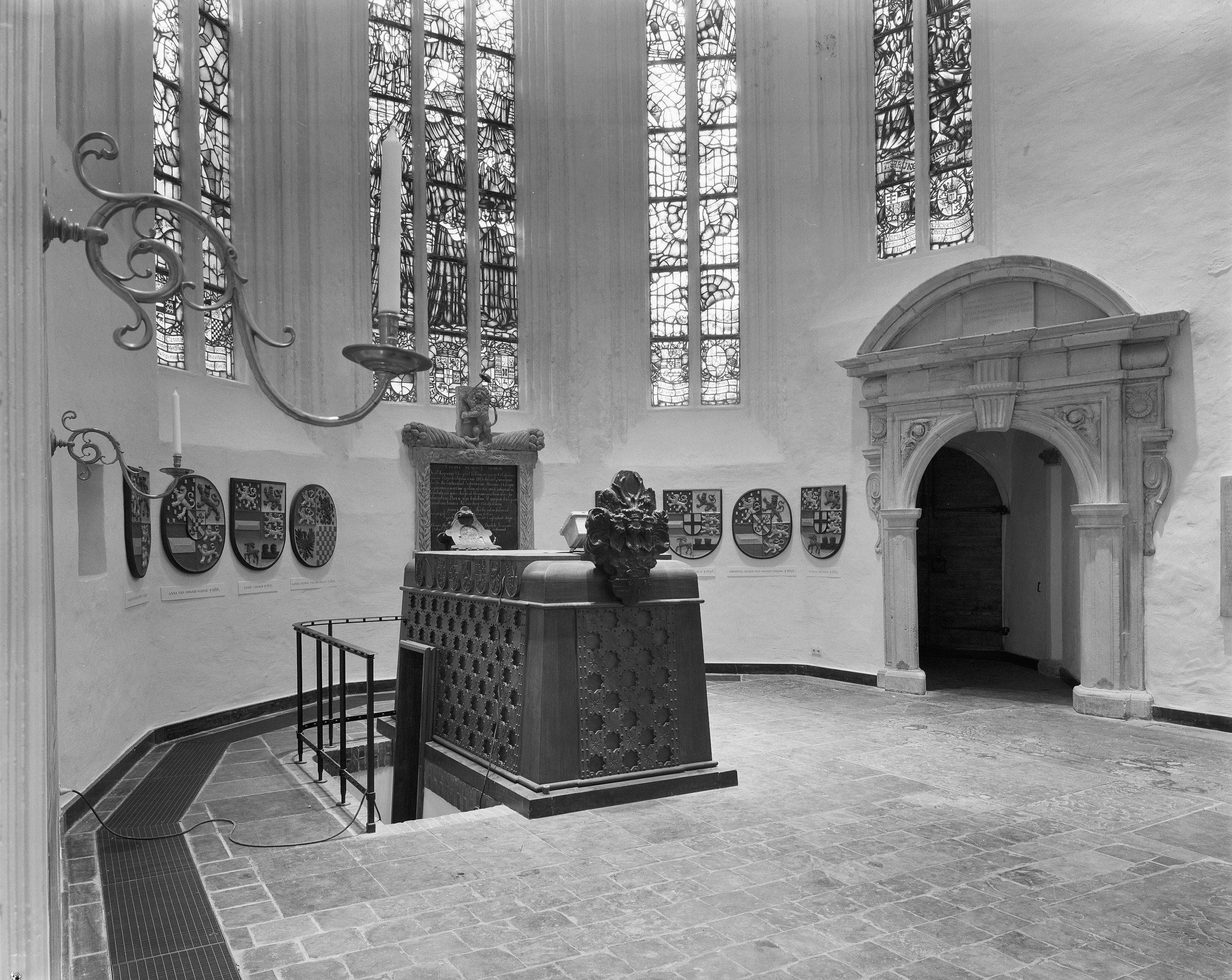 Hervormde Grote of Jacobijnerkerk: interieur naar het koor